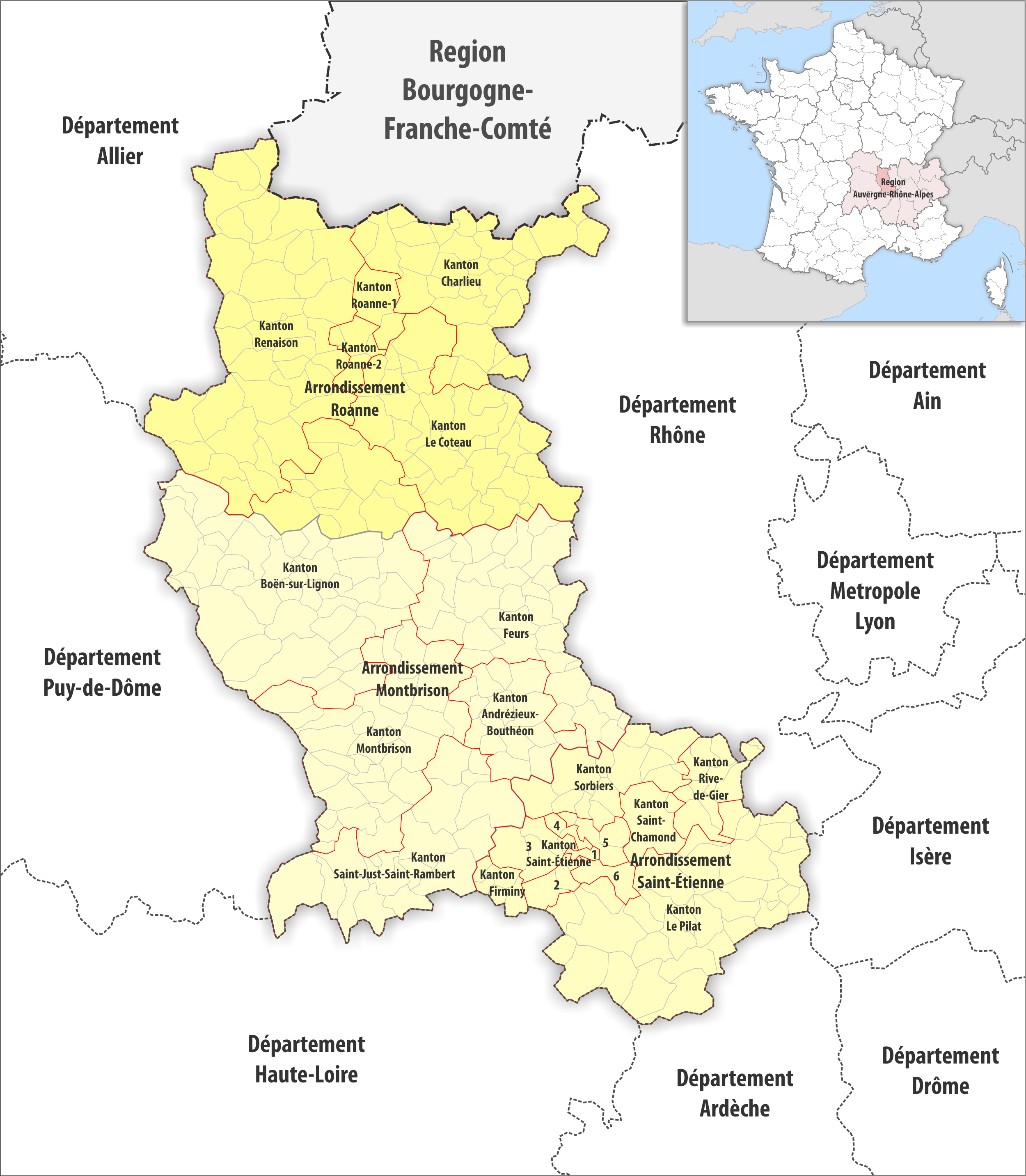 Gemeinden, Kantone und Arrondissemente im Departement Loire